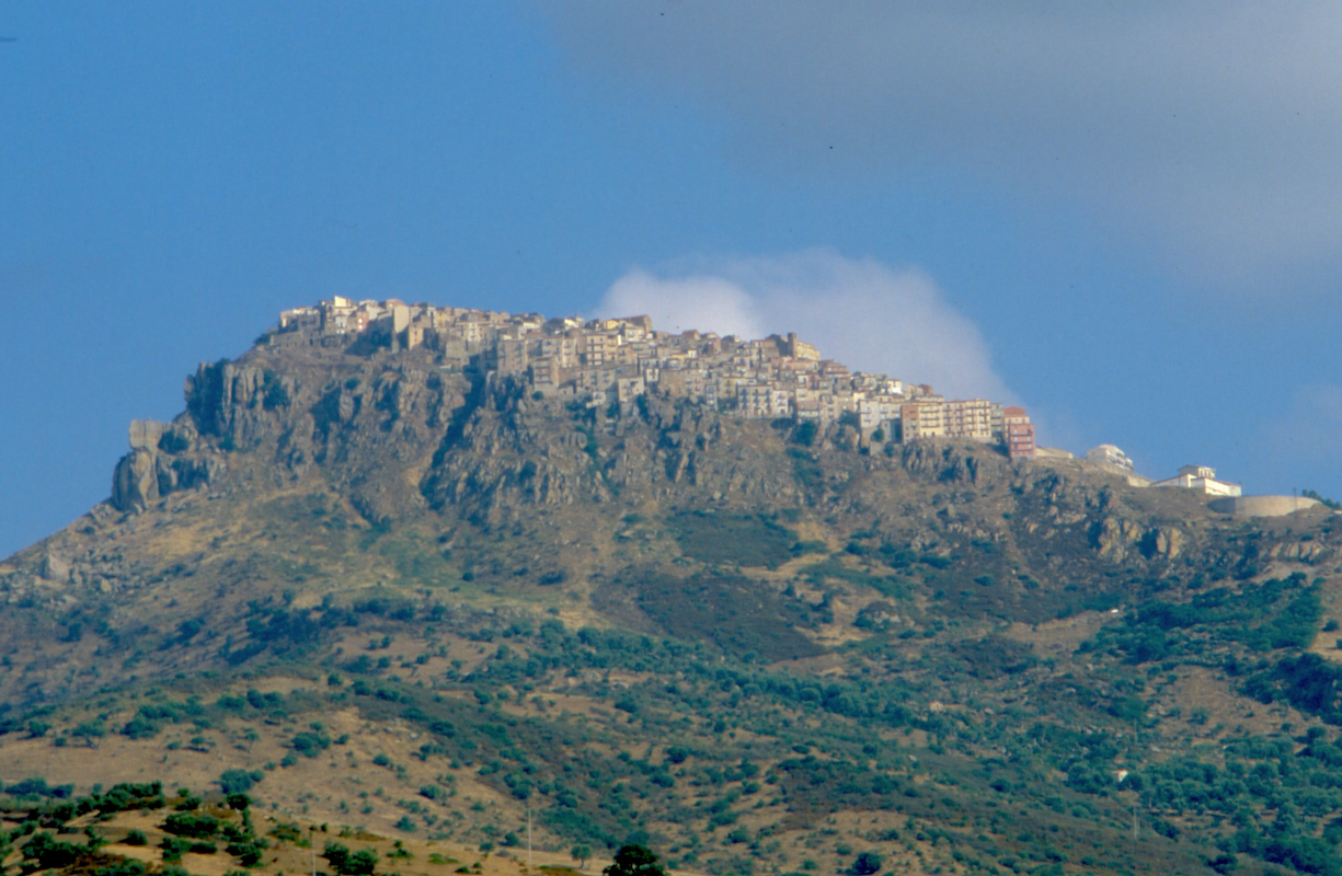 Pollina, Palermo, Sicily